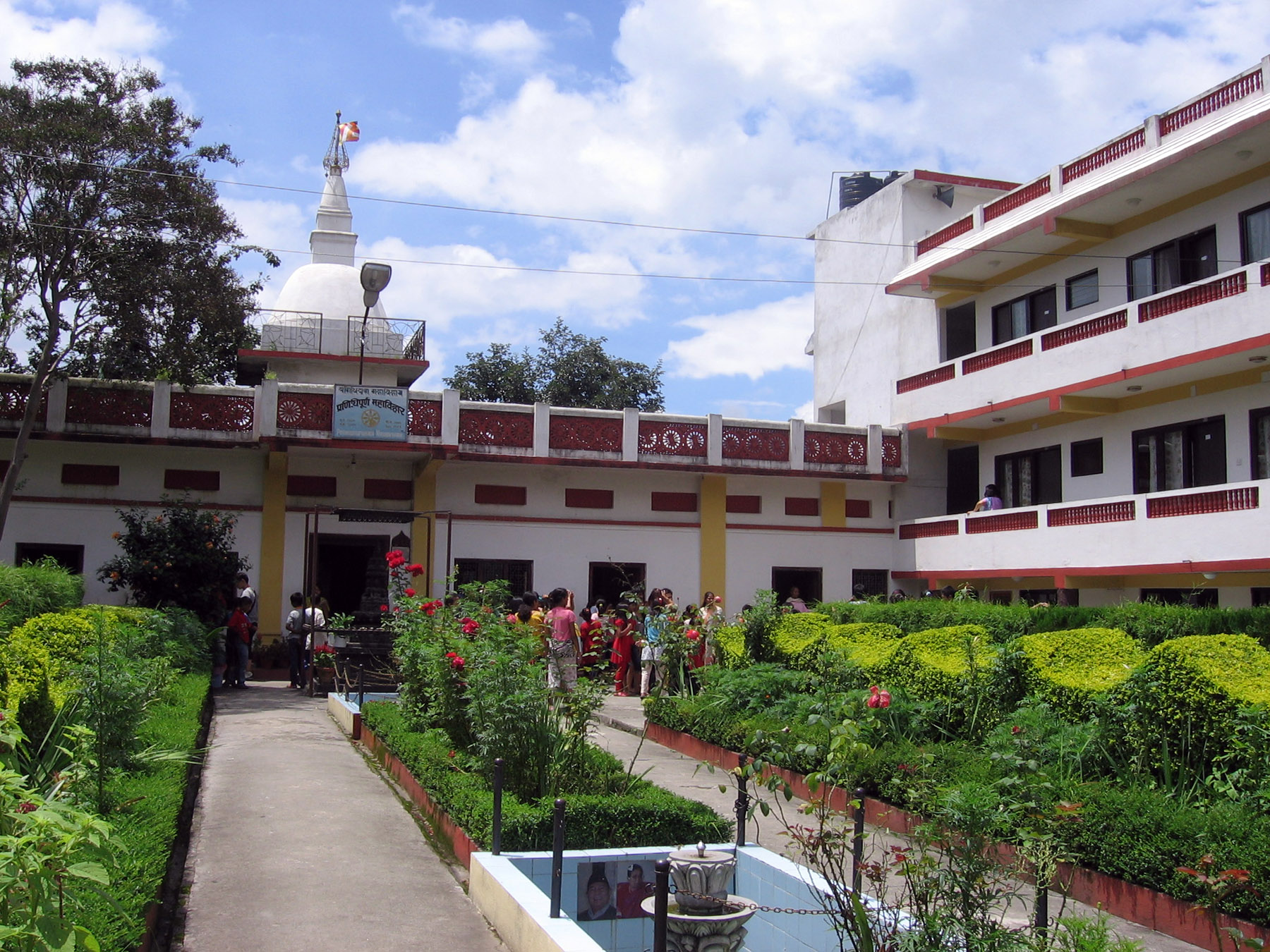 Balambu Bihar, a Theravada Buddhist monastery in Kathmandu, Nepal.